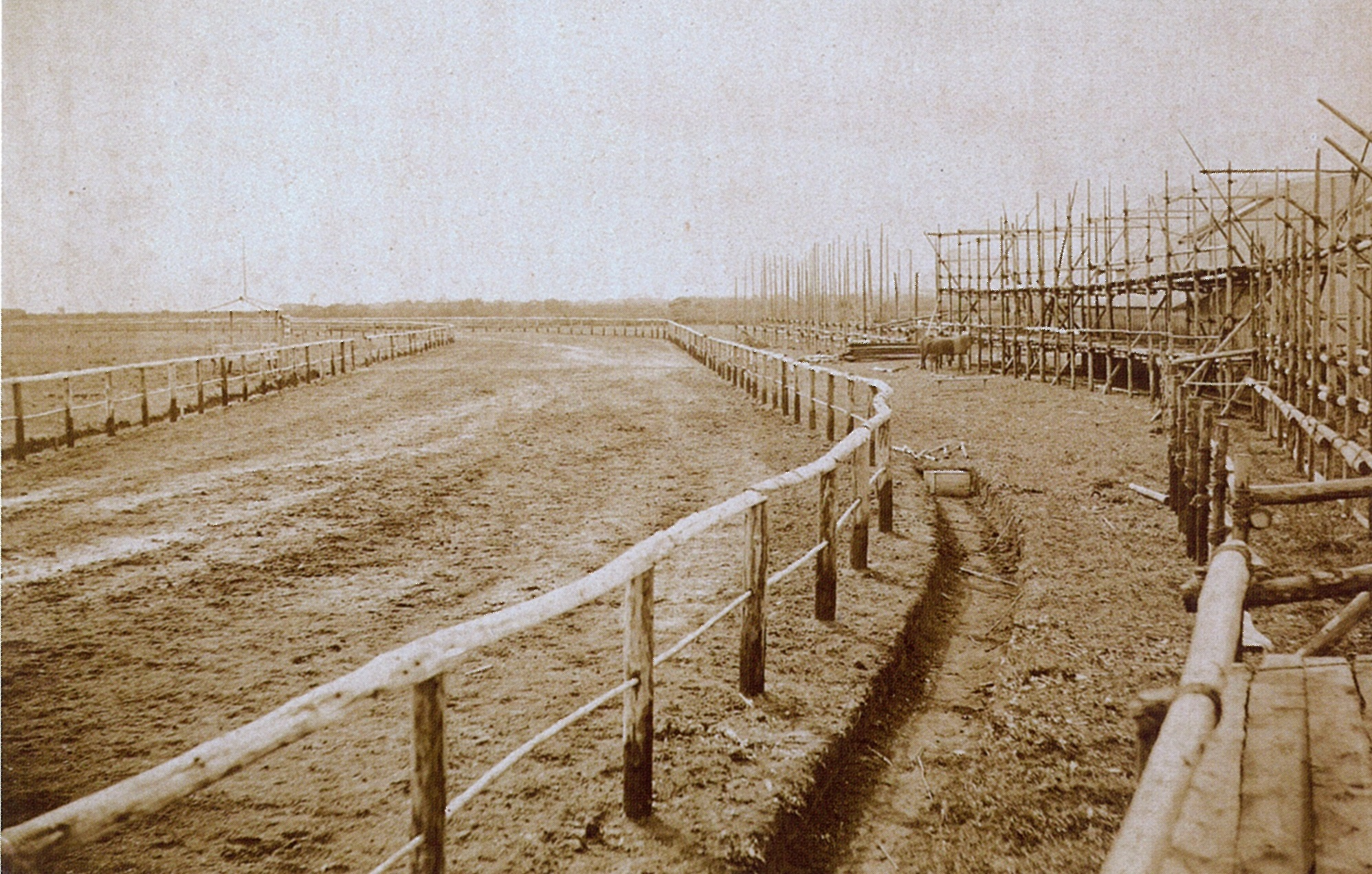 1882年(明治15年) 建設中の旧函館競馬場